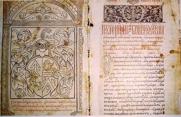 Евангелле Вучыцельнае Беларуская (тарашкевіца): Эвангельле вучыцельнае